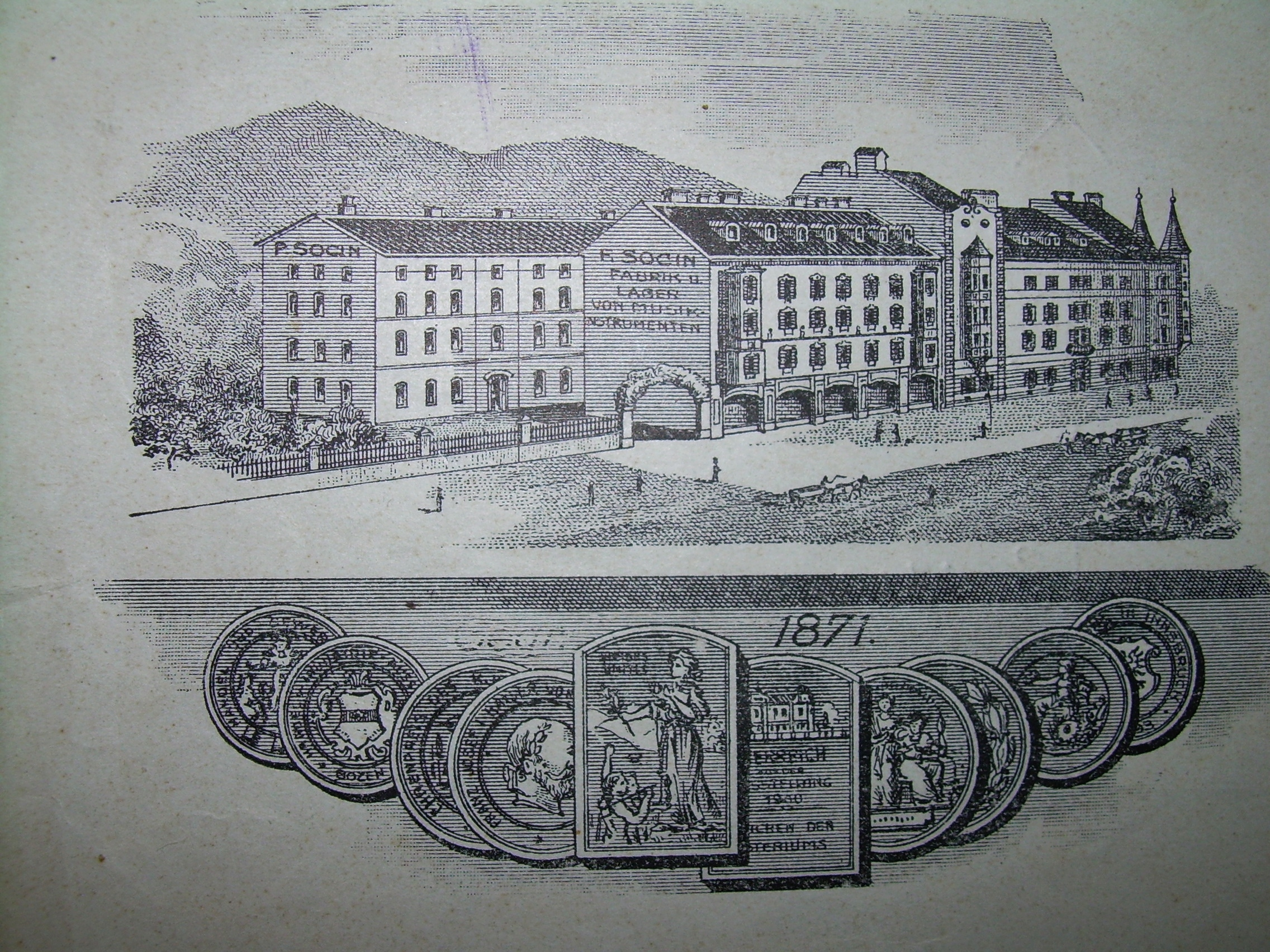 Fonte Archivio Storico della Città di Bolzano Sotto il disegno il medagliere delle diverse premiazioni